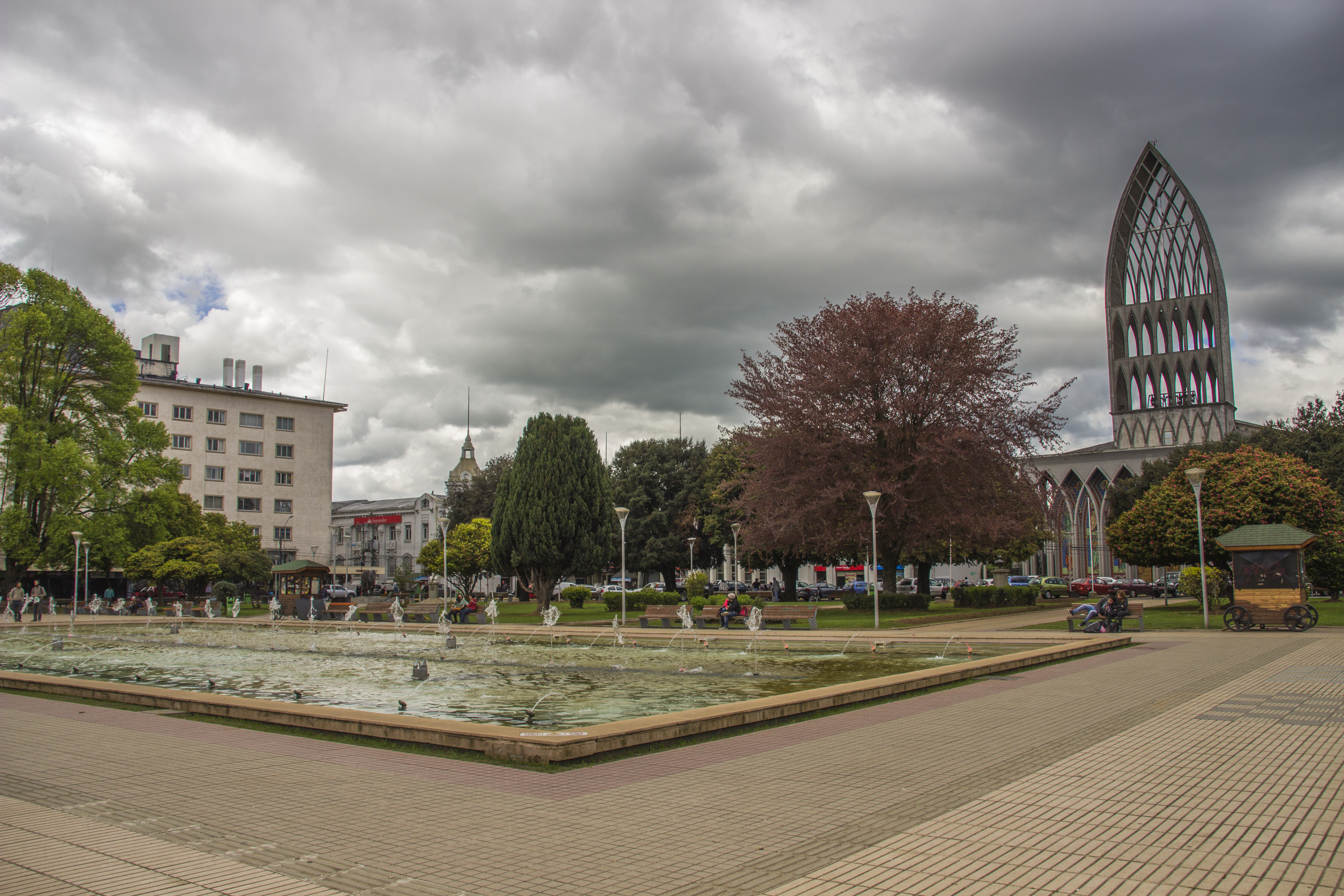 Plaza principal ciudad de Osorno